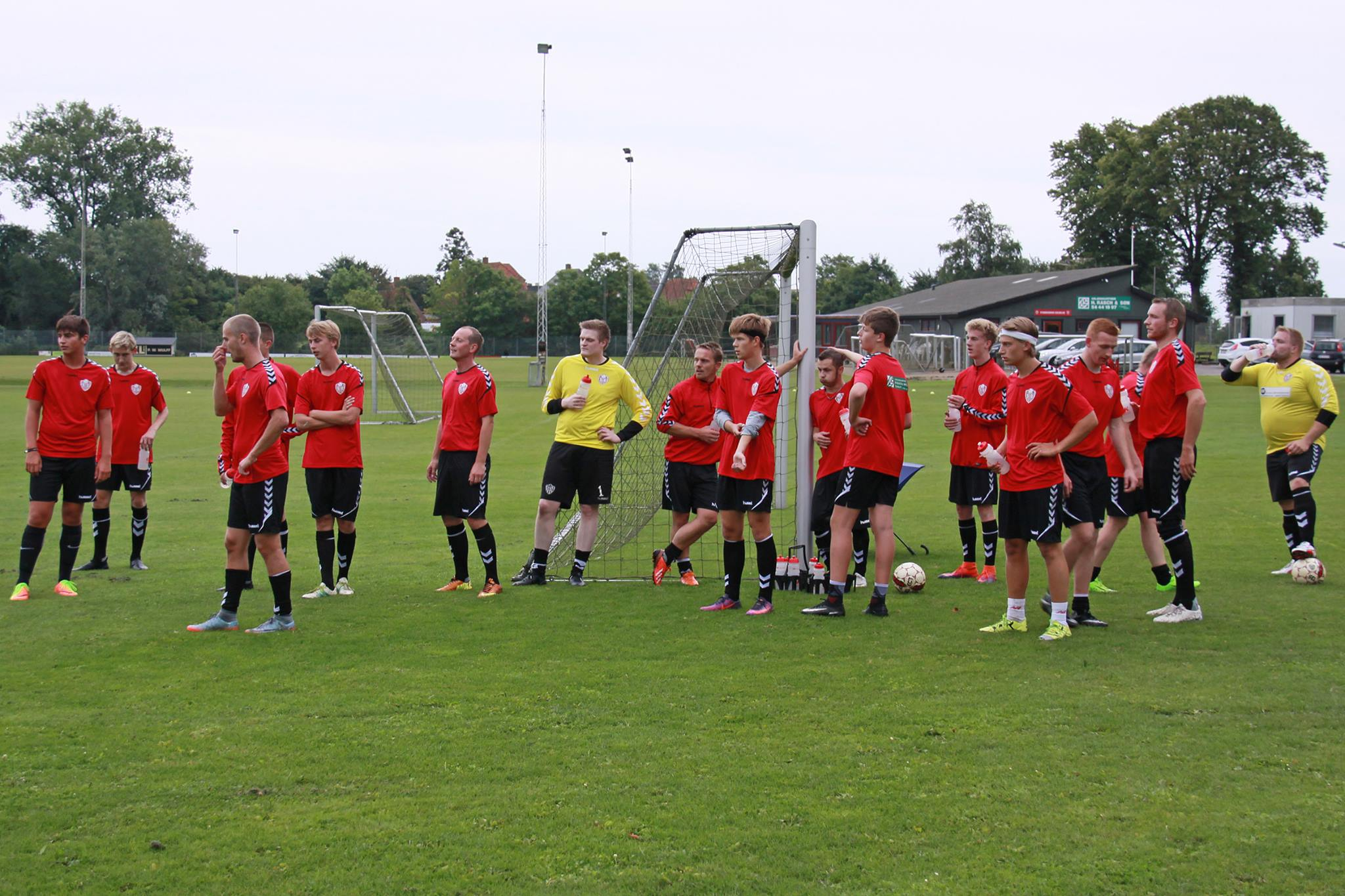 Pause under træning.